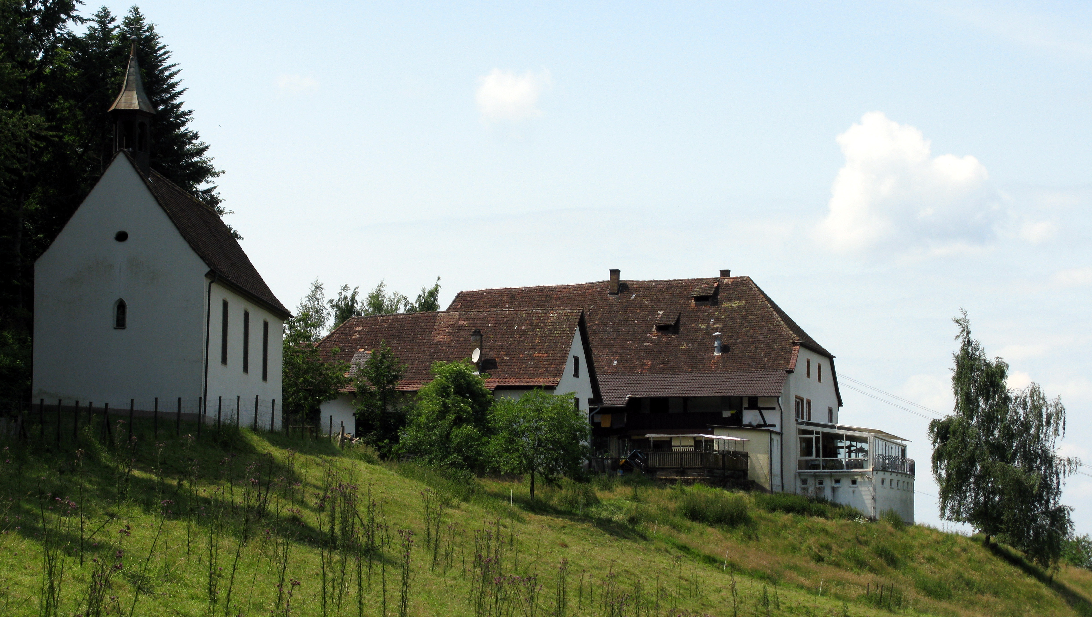 Gotthardthof in Staufen mit Kapelle